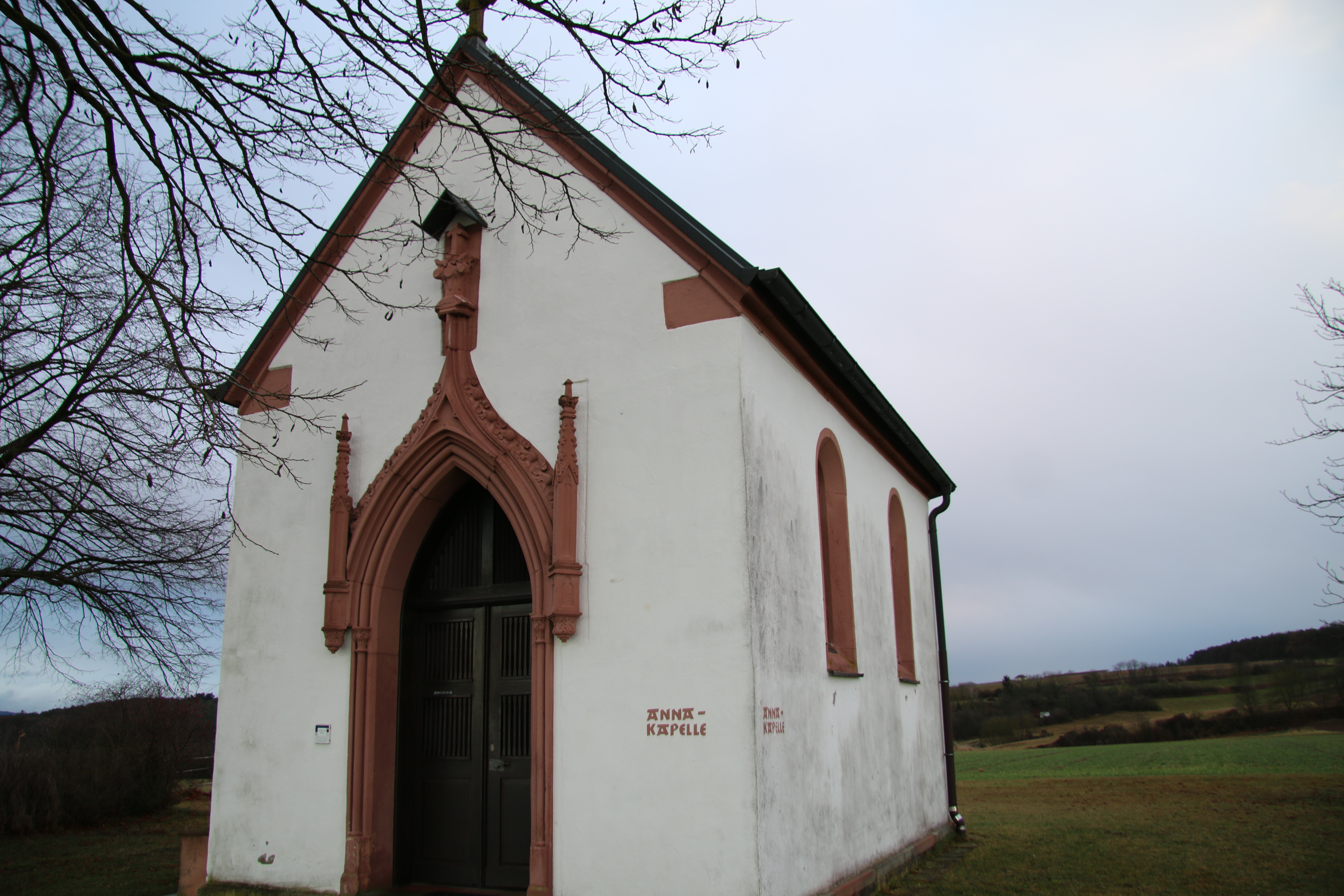 Die Sankt Anna Kapelle mit ihrem kunstvollem neugotischem Eingang Großostheim, Bayern